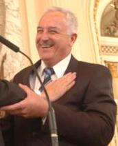 Casa Rosada, Salón Blanco - El presidente Néstor Kirchner y el flamante ministro de Desarrollo Social, Juan Carlos Nadalich, durante el acto de asunción de los nuevos integrantes del Gabinete Nacional.